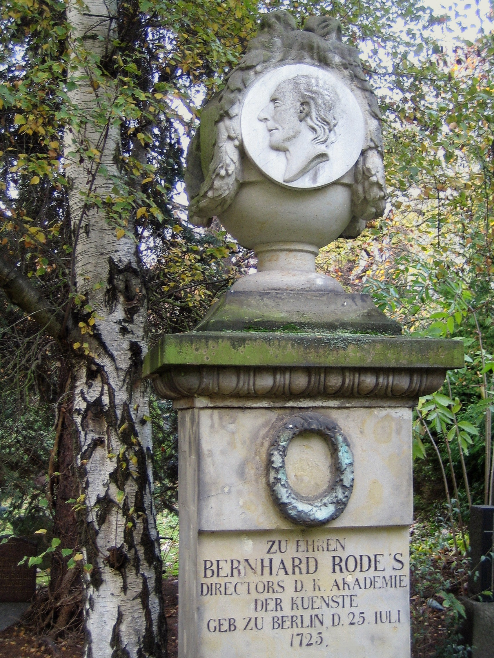 Grabmal des Berliner Malers Bernhard Rode (1725-1797). St.-Marien- und St.Nikolai-Friedhof 1, Berlin. Teilansicht.